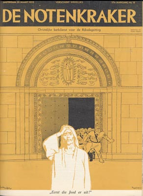 Tijdschrift De Notenkraker. Jrg. 27, no. 12 (25 maart 1933). Christelijke kerkdienst voor de Rijksdagzitting. "Eerst die Jood er uit!".